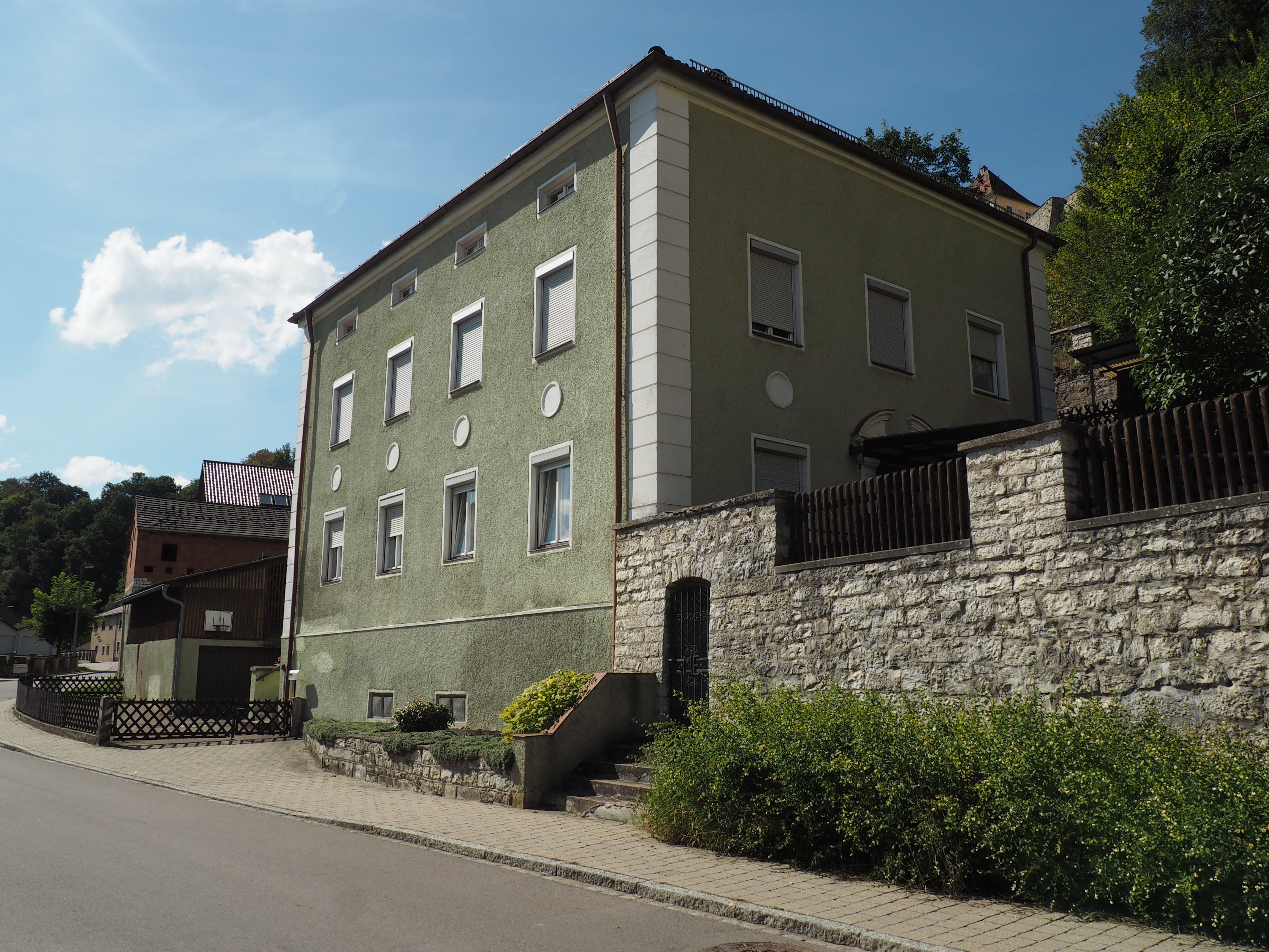 Zweigeschossiger Zeltdachbau, mit rustizierten Ecklisenen, 1855This is a photograph of an architectural monument.